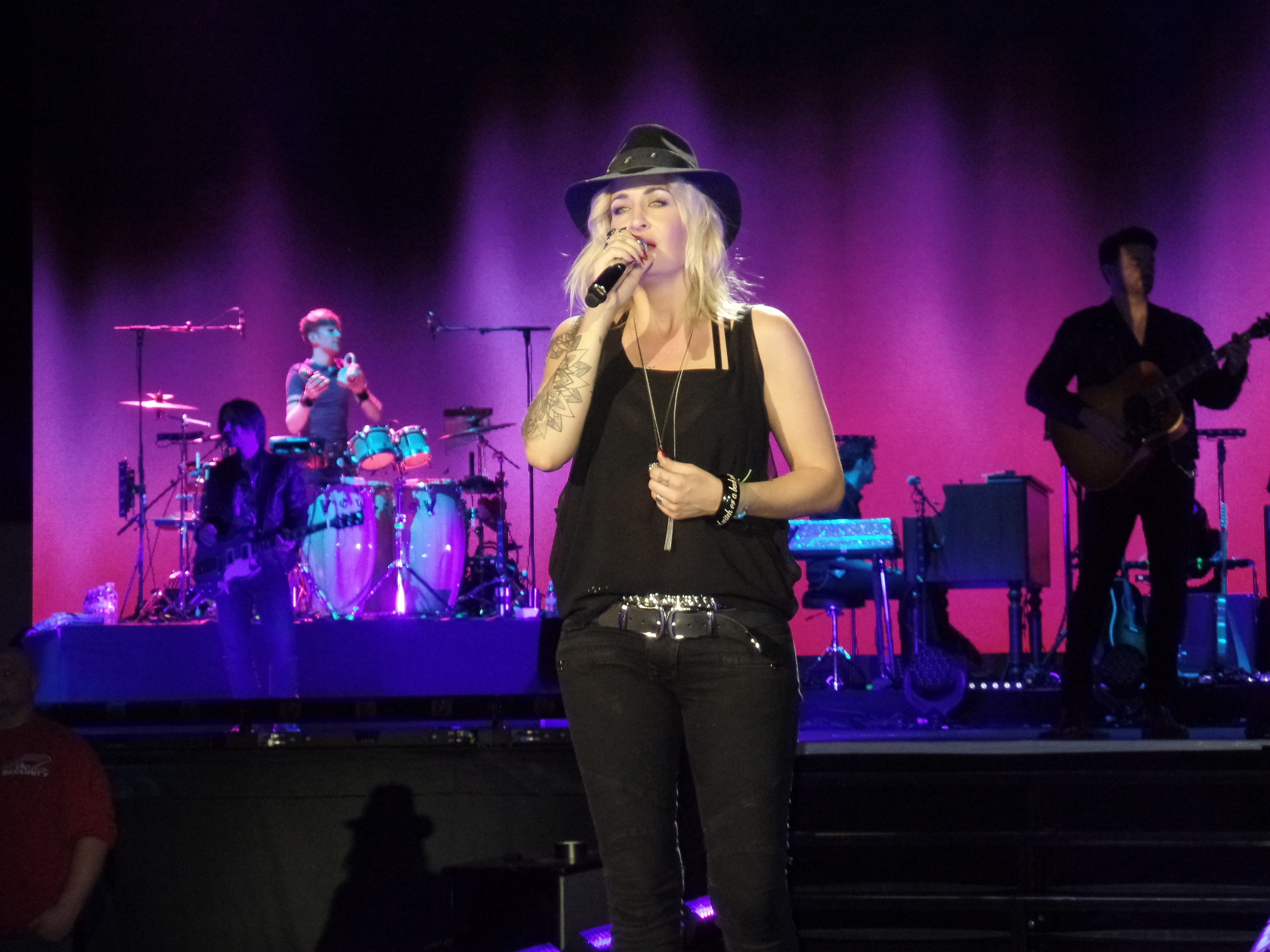 Sarah Connor während ihrer Muttersprache-Tour in Bremen